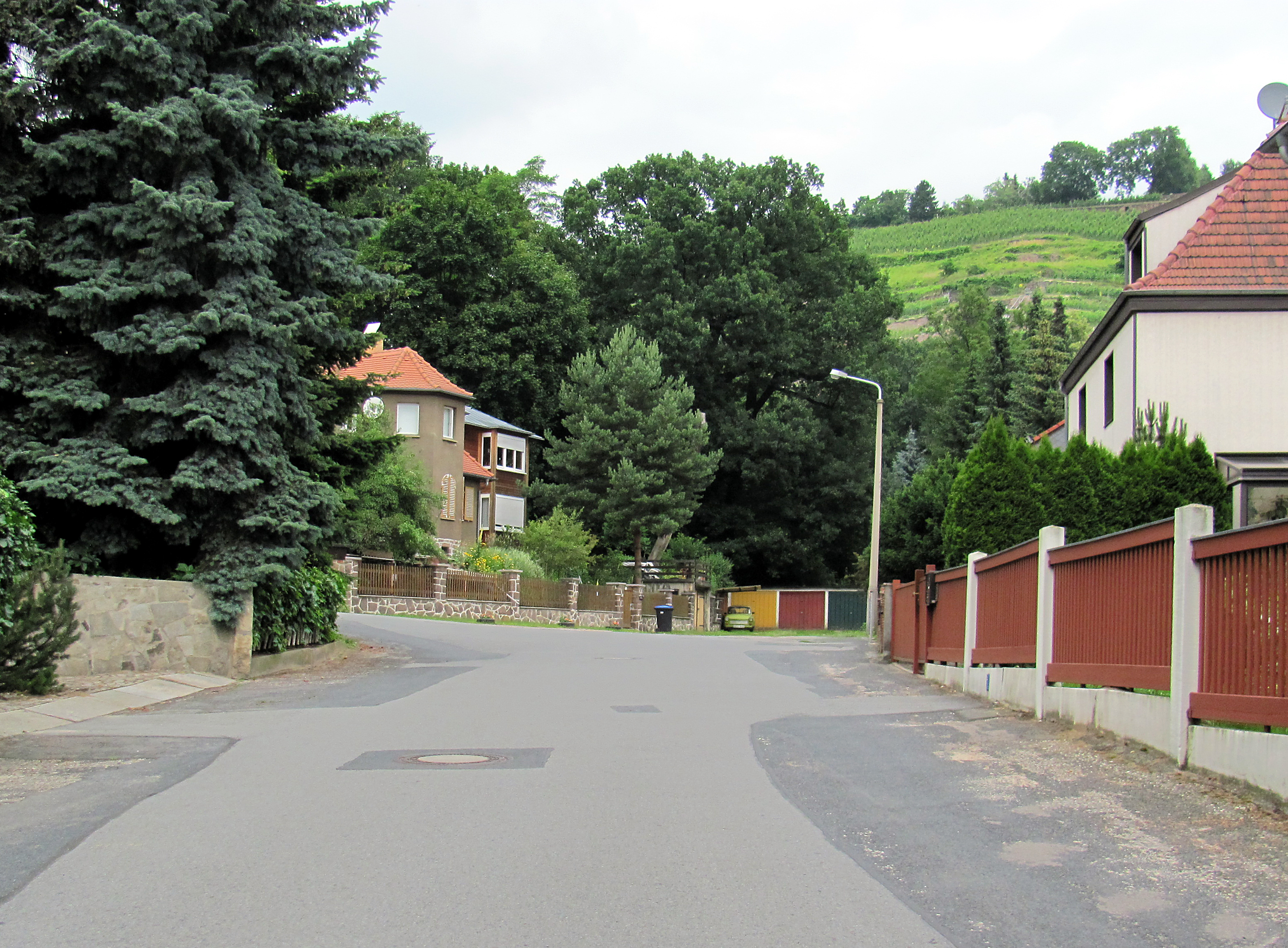 Radebeul-Oberlößnitz, An der Jägermühle, Fläche des trockengelegten Mühlteichs der Jägermühle